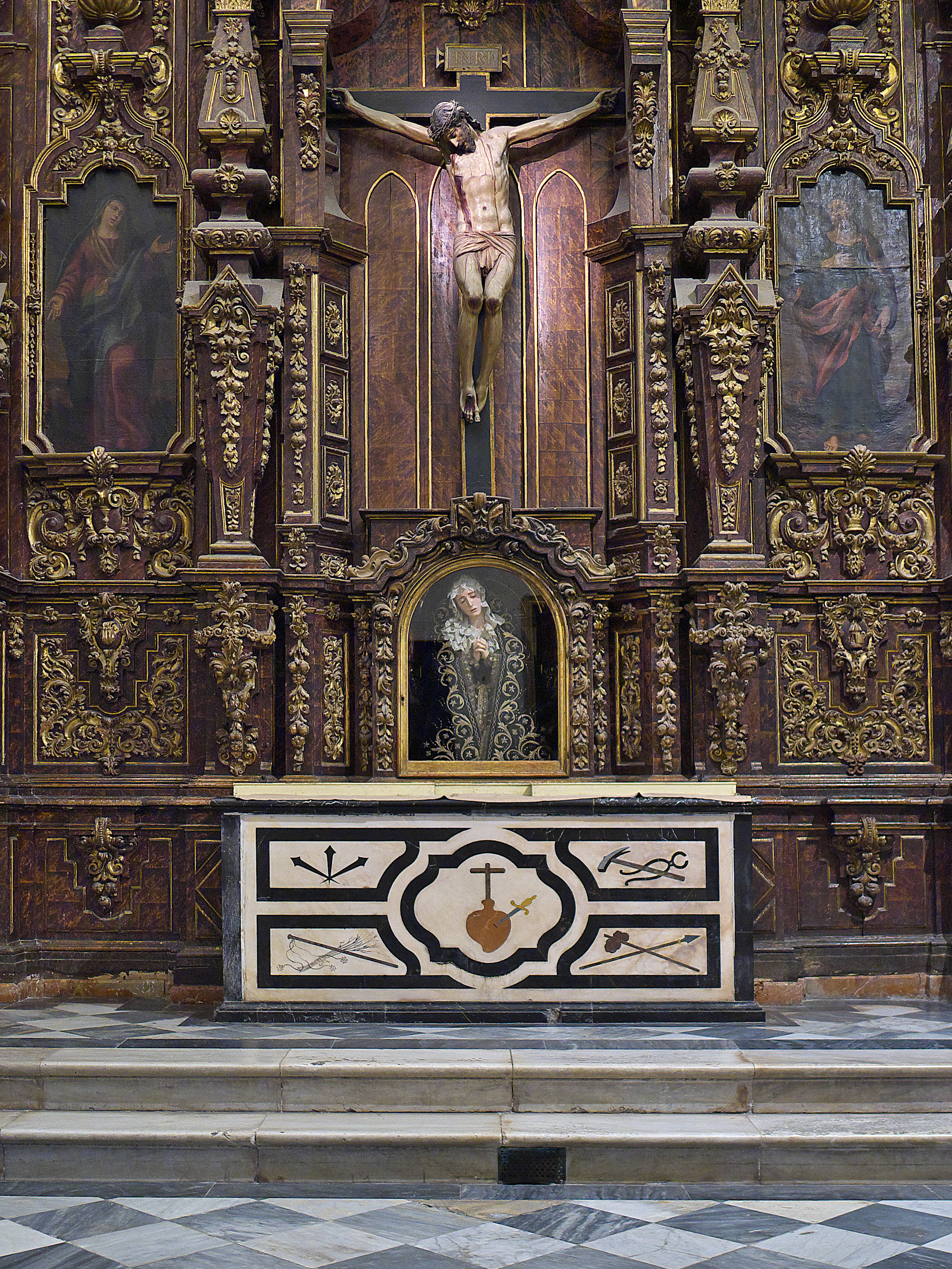 Preside la talla de un Crucificado atribuído a Juan Bautista Vázquez el Viejo. La Virgen de los Dolores es obra de Pedro de Mena (ca. 1680)